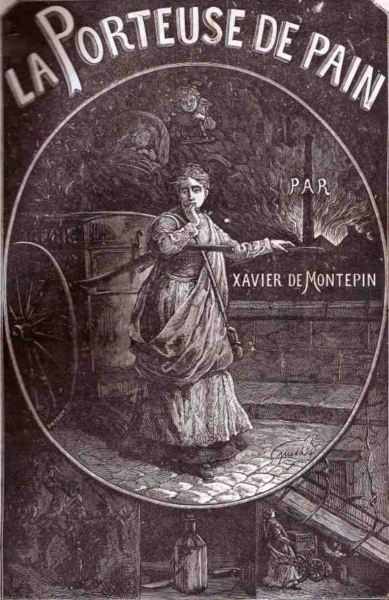 "La Porteuse de pain" by French writer Xavier de Montépin (1823-1902)